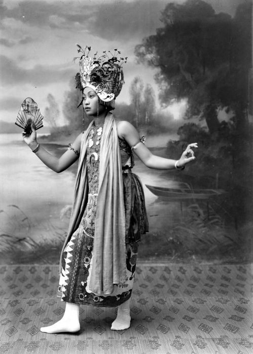 Negatief. Studioportret van een gandrung danseres